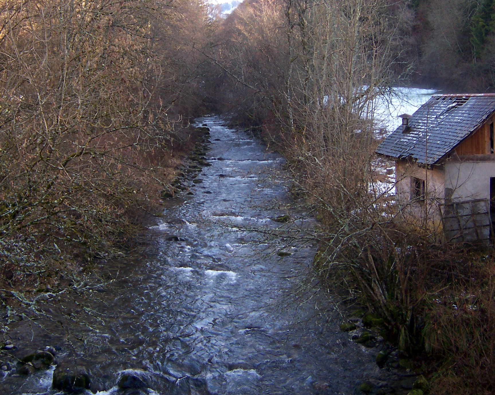 The river Chéran at Ecole-en-Bauges (Savoie)